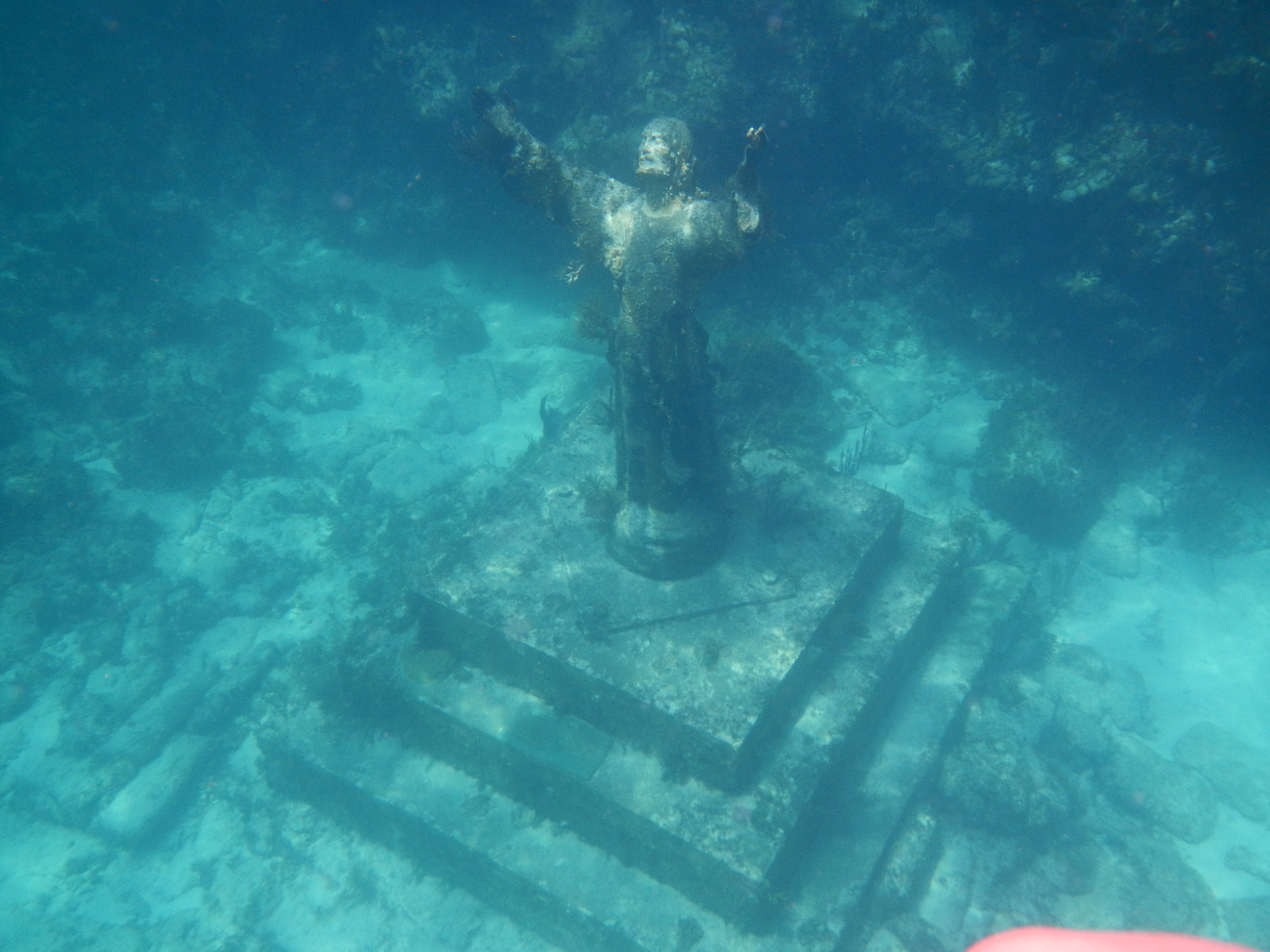 Jesus statue